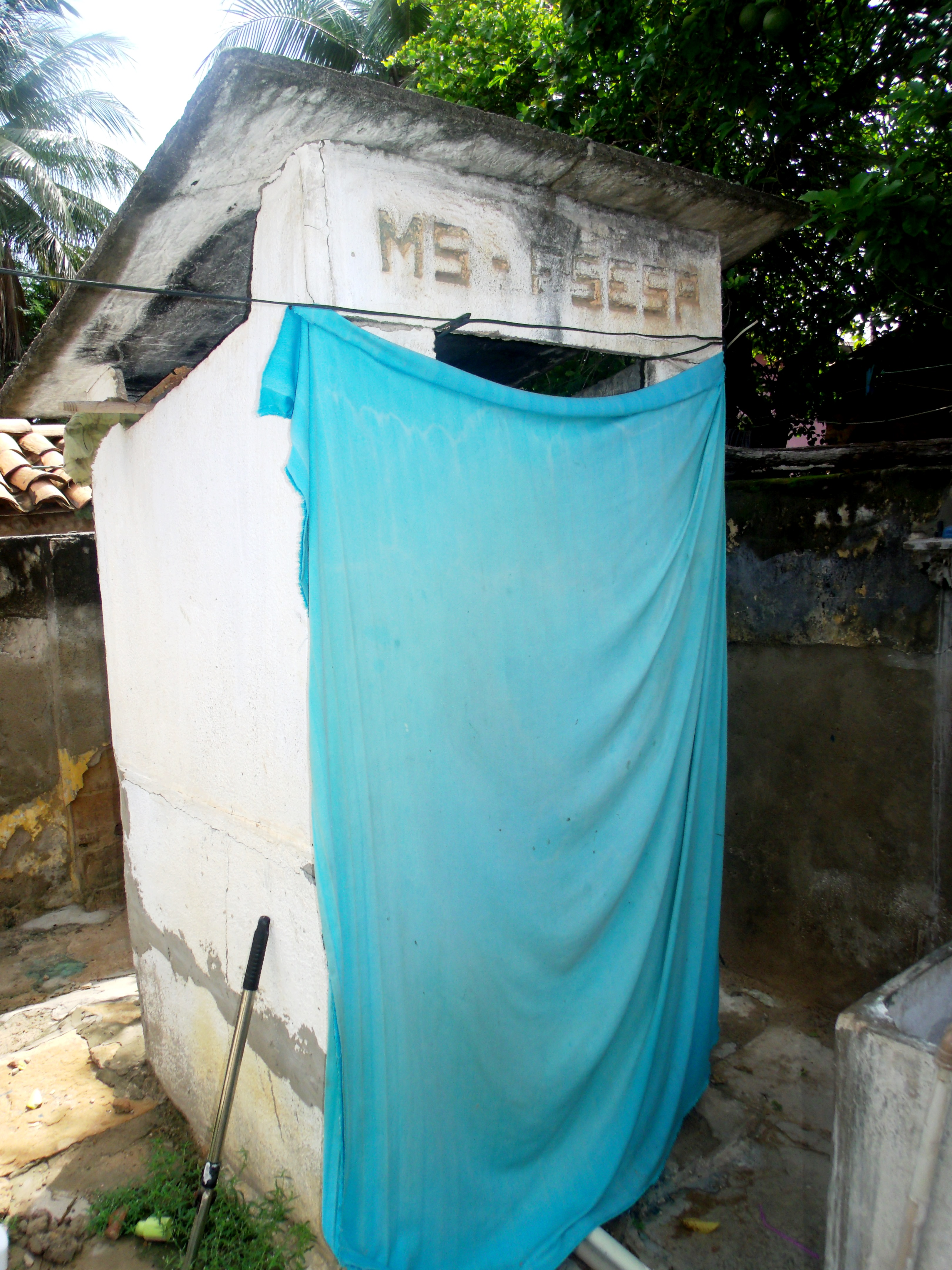 Uma fossa séptica, um tipo de engenharia sanitária, que a Fundação Serviços de Saúde Pública (FSESP), do Ministério da Saúde do Brasil fazia na segunda metade do século 20.